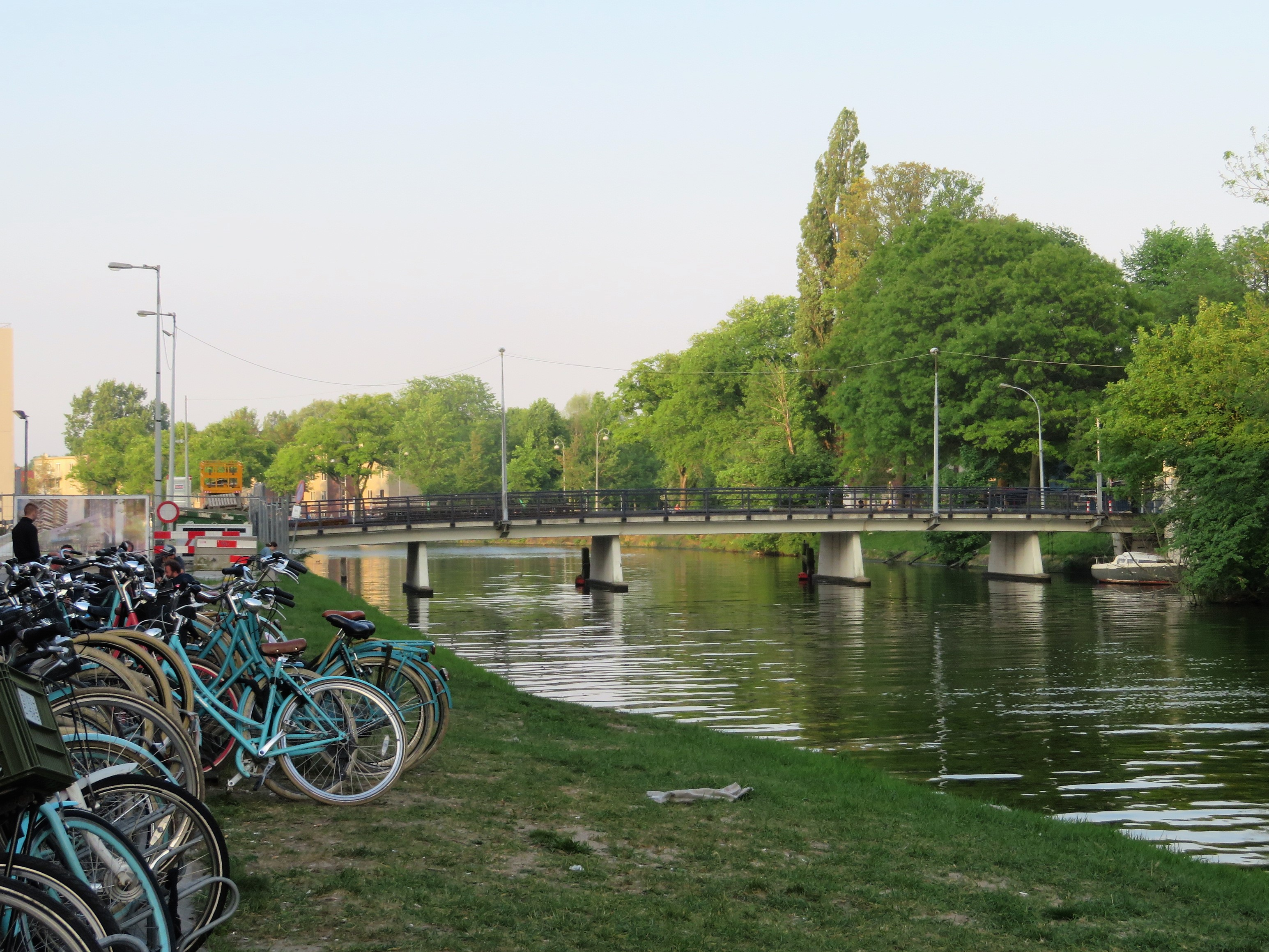 Elsje Christiaensbrug over het Buiksloterkanaal in Amsterdam-Noord. Brugnummer 2474